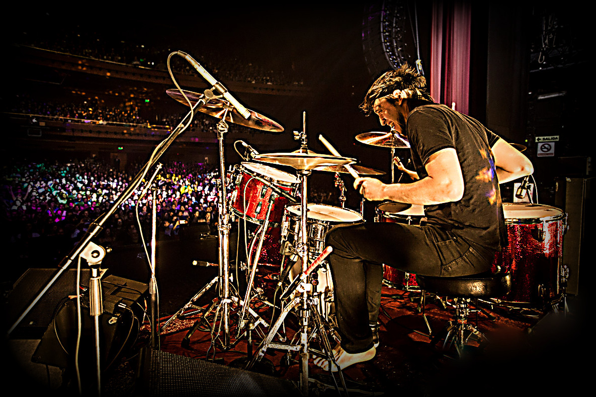 Catriel en acción, Teatro Gran Rex Marzo de 2017.